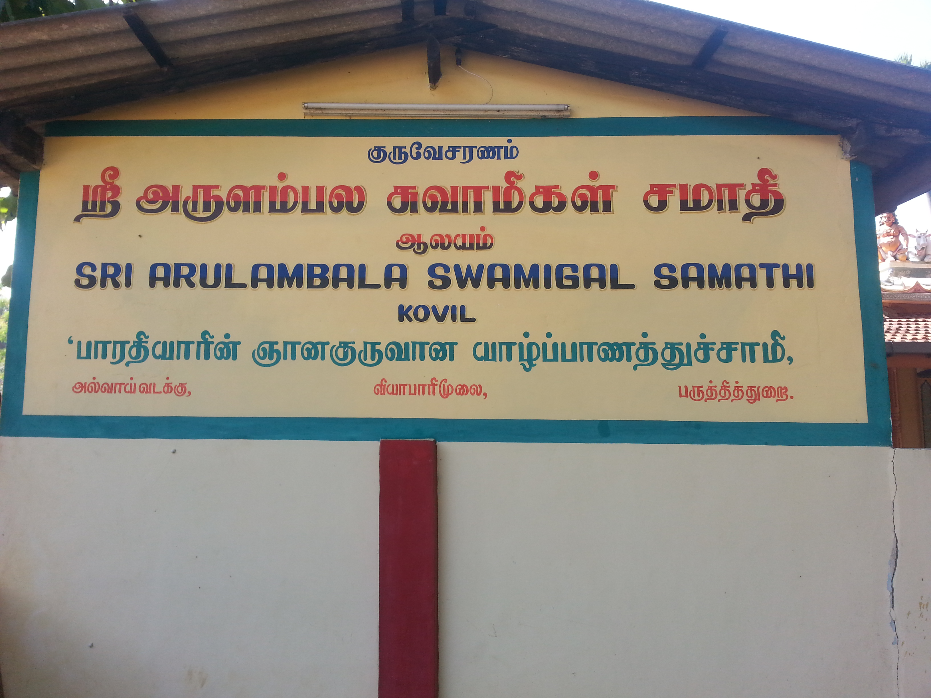 மௌனகுரு அருளம்பல சுவாமிகளின் சமாதி ஆலயத்தின் பெயர்ப்பலகை